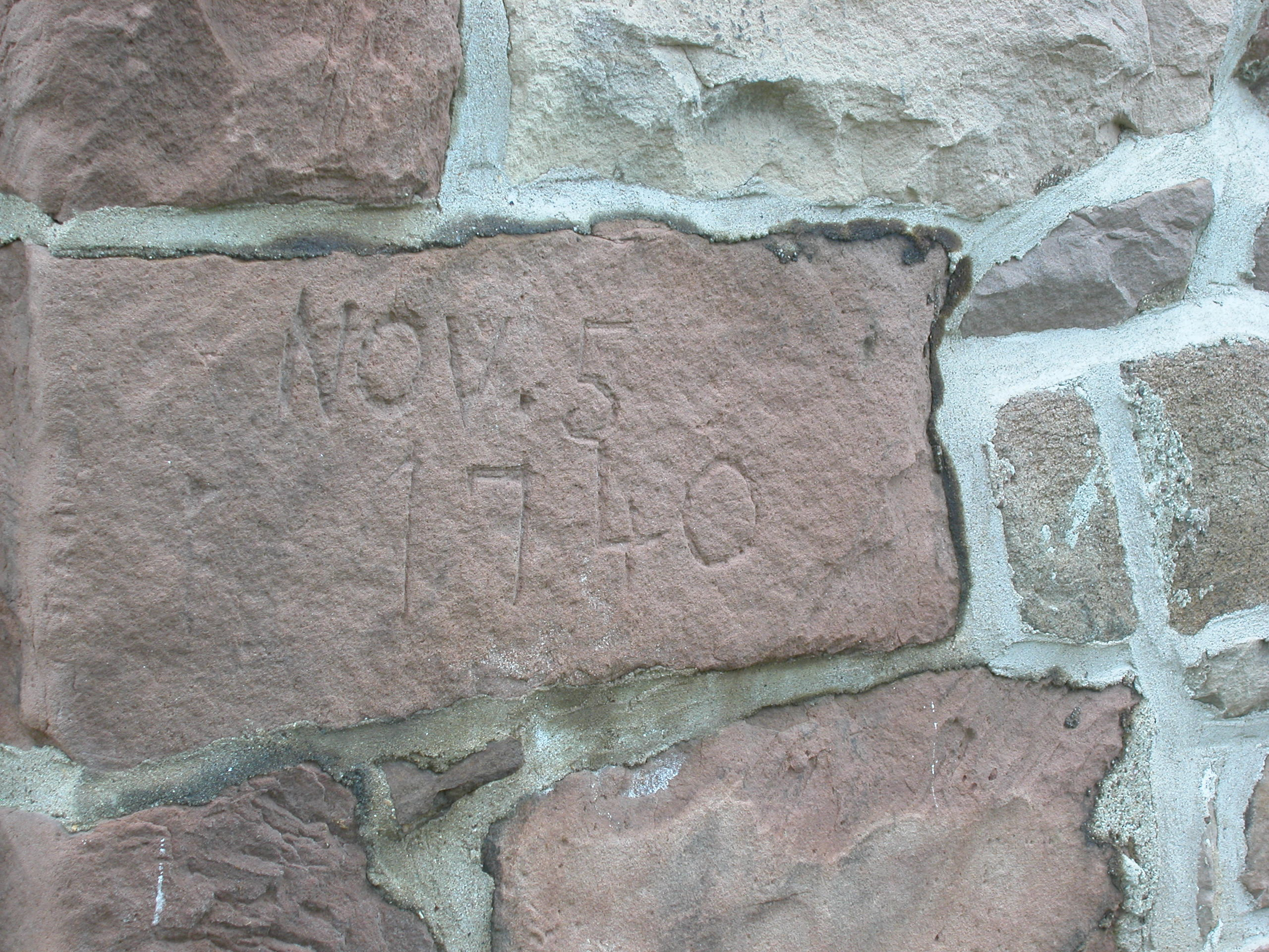 Van Ness House cornerstone, Fairfield New Jersey